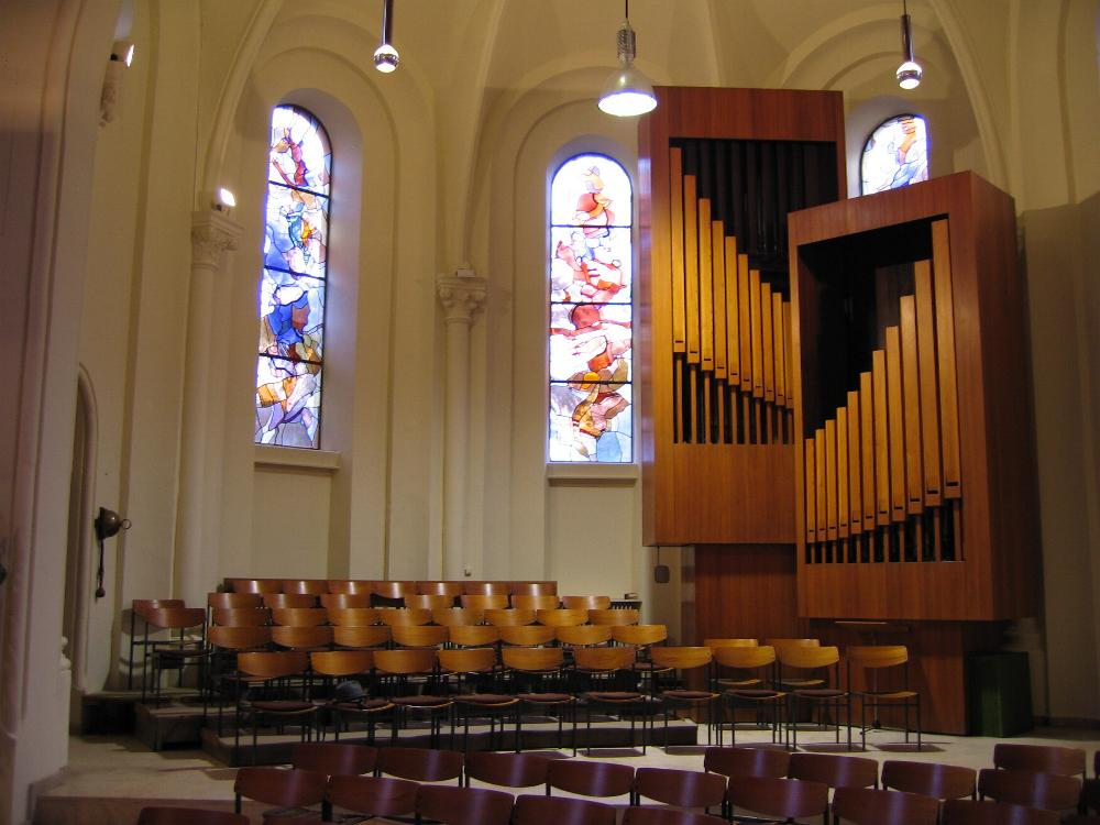 D'Uergel an der Bieleser Kierch. Foto vum Pear 12:19, 4 September 2006 (UTC) 03.09.2006. Bieles Kategorie:Gemeng Suessem